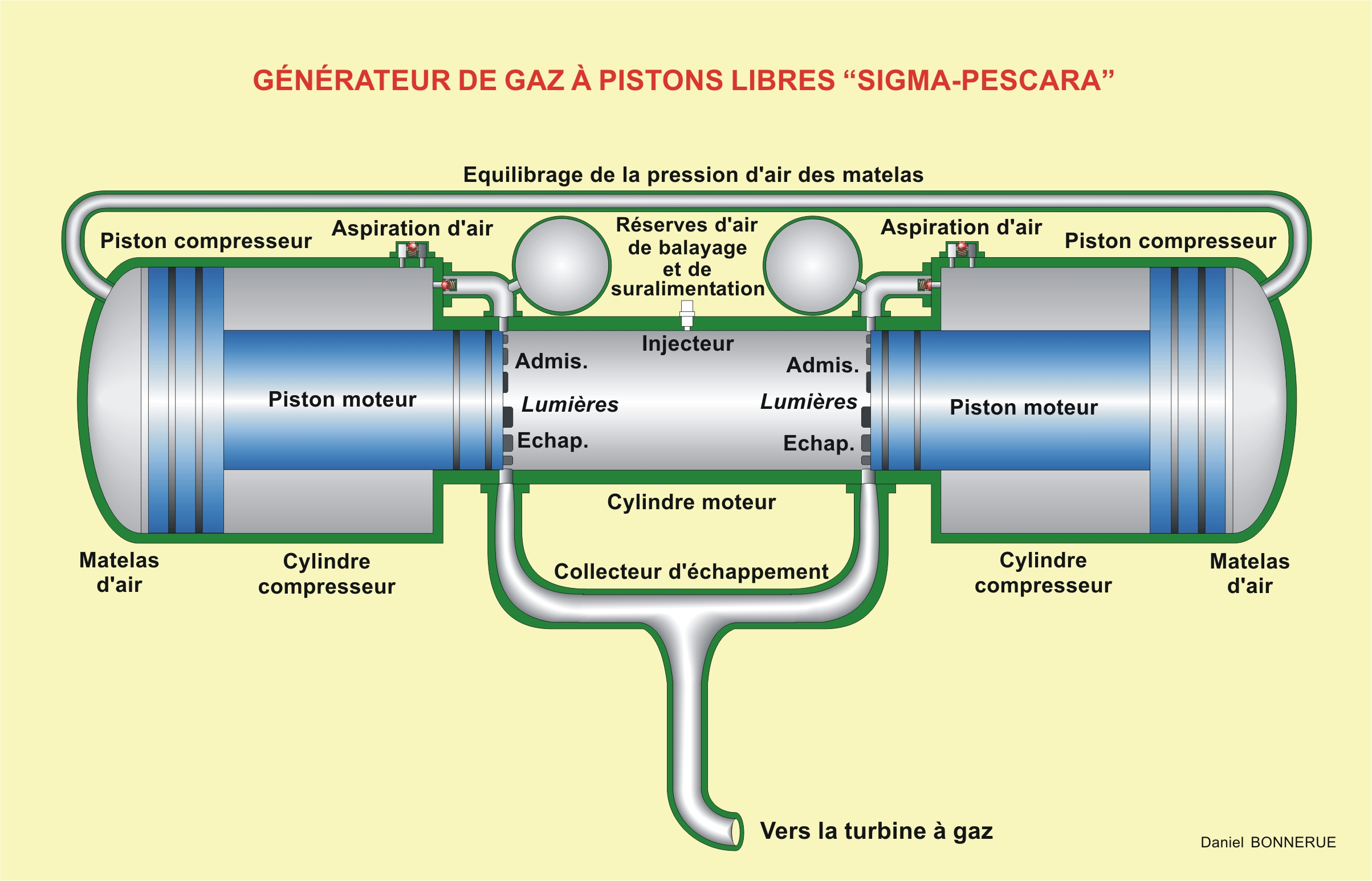 Schéma en coupe du générateur à pistons libres Pescara par Daniel BONNERUE (dessiné le 21/08/2006 en vectoriel puis transformé le même jour en bitmap JPG)